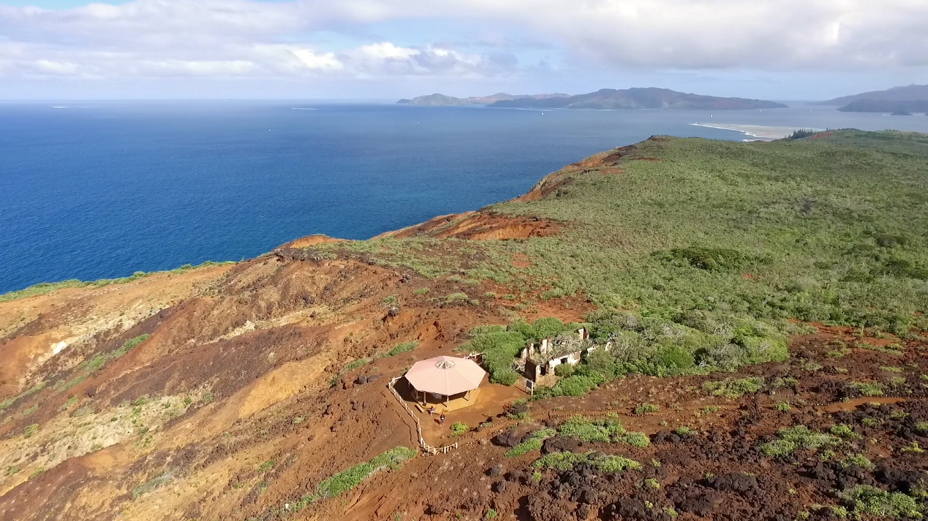 Le cap n’dua vestige de l’ Ancienne poste de nouvelle Calédonie